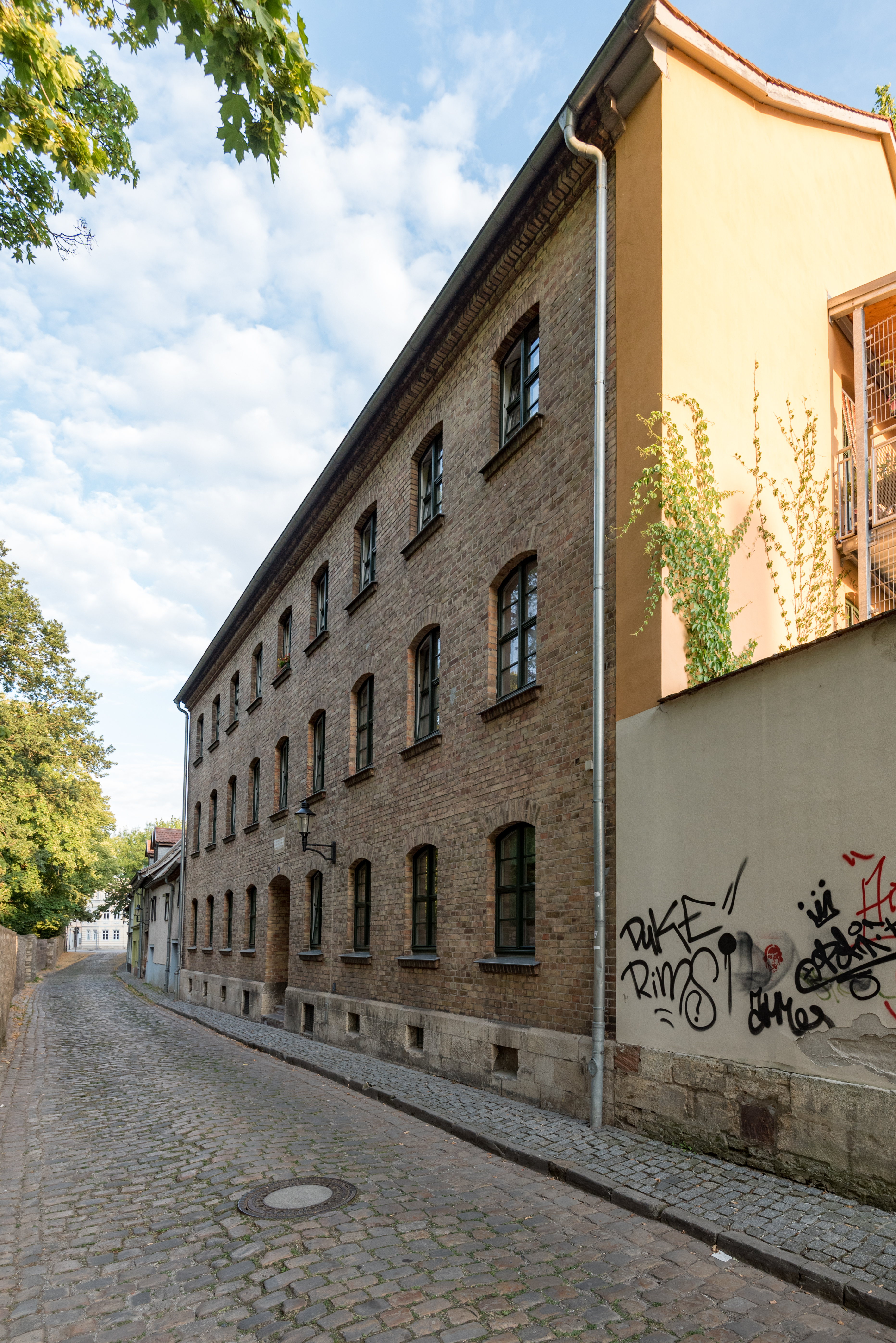 Naumburg (Saale), Neumauer 4